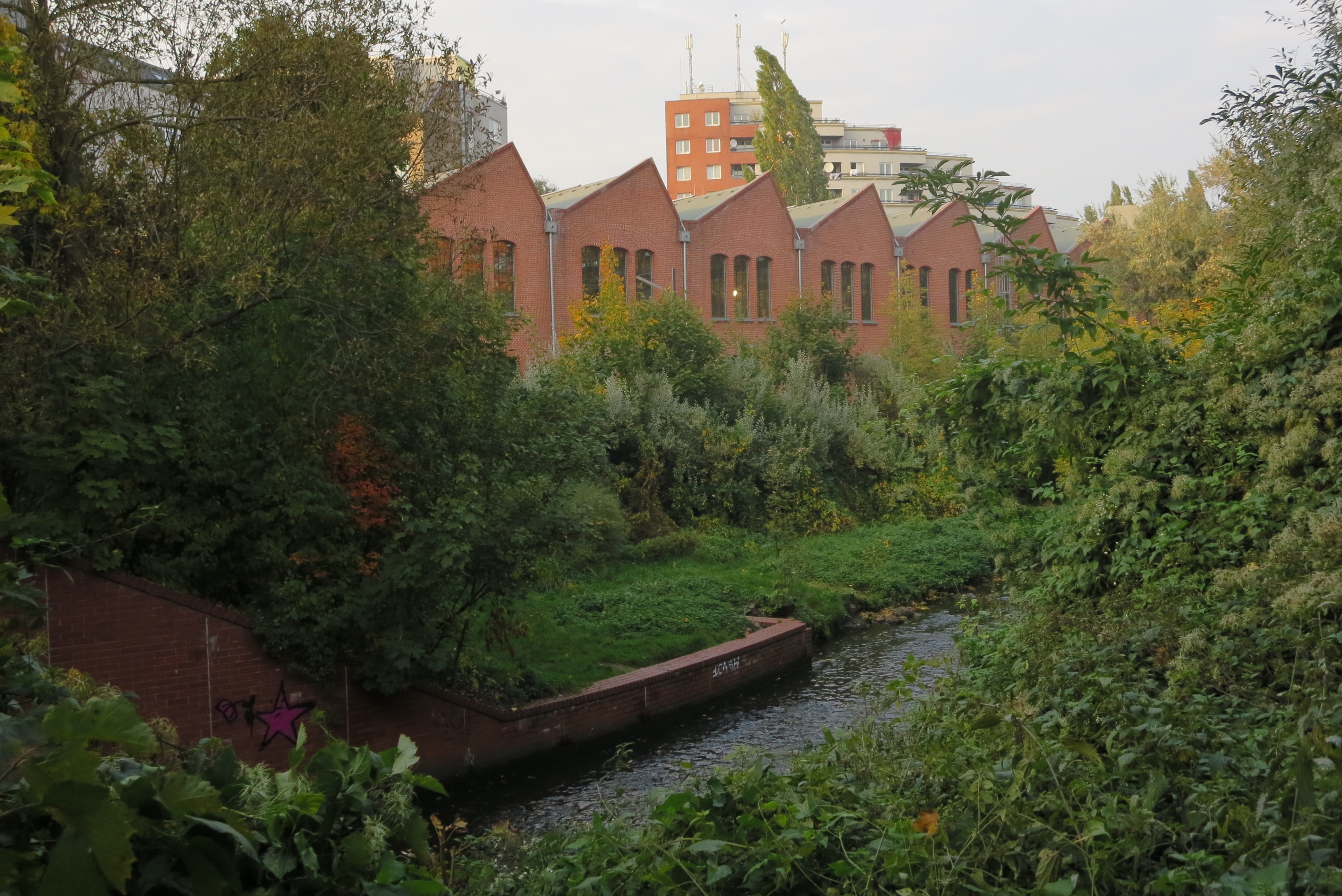 Tresorfabrik Karl Arnheim, Blick vom Panke-Ufer